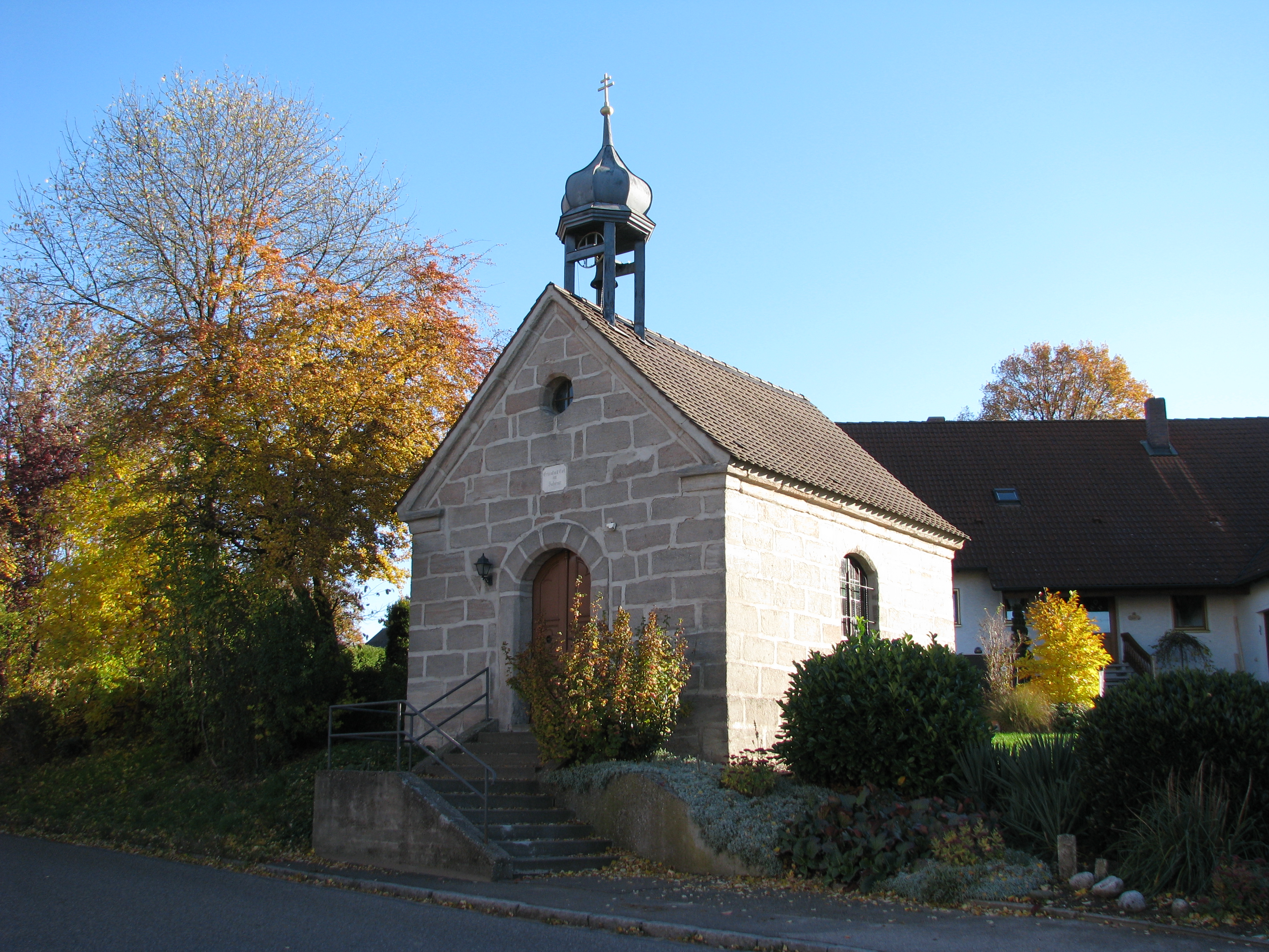 Solar, Ortsteil von Hilpoltstein im mittelfränkischen Landkreis Roth (Bayern), Ortskaeplle